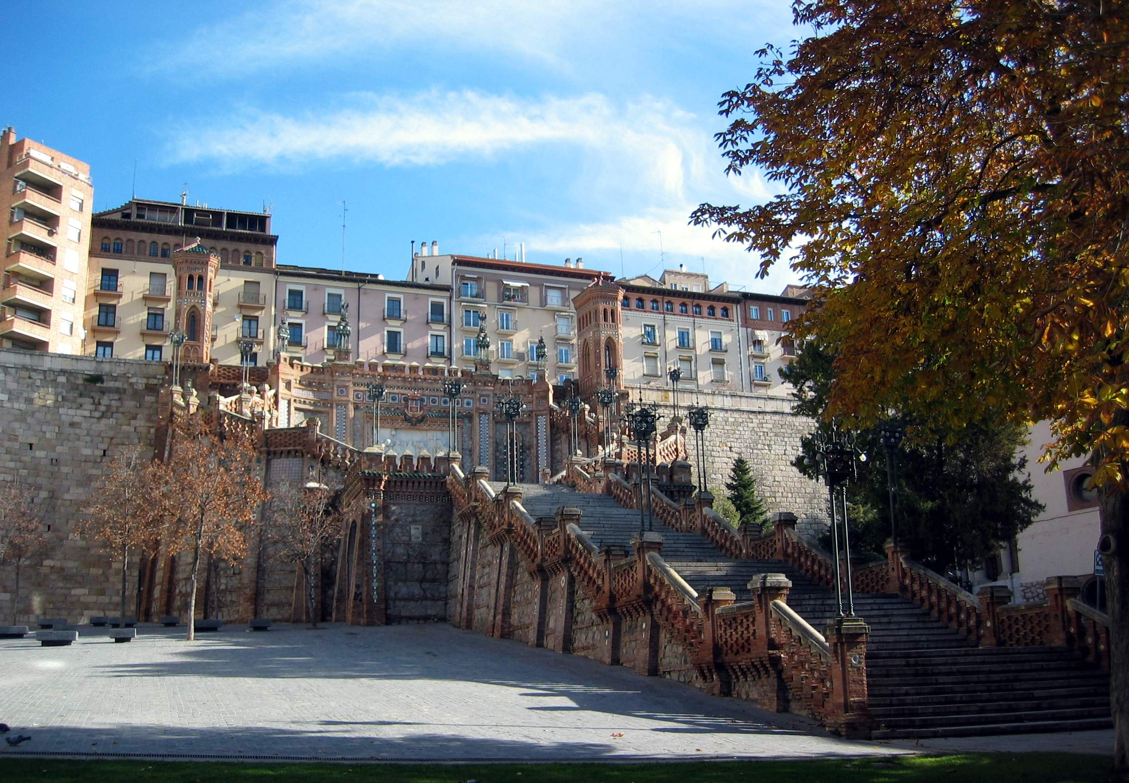 Vista general (septentrional) de la Escalinata de la Estación en Teruel, obra de José Torán de la Rad en Teruel (1920-1921), año 2016.